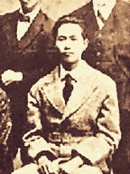 中文（台灣）: 林木順相片